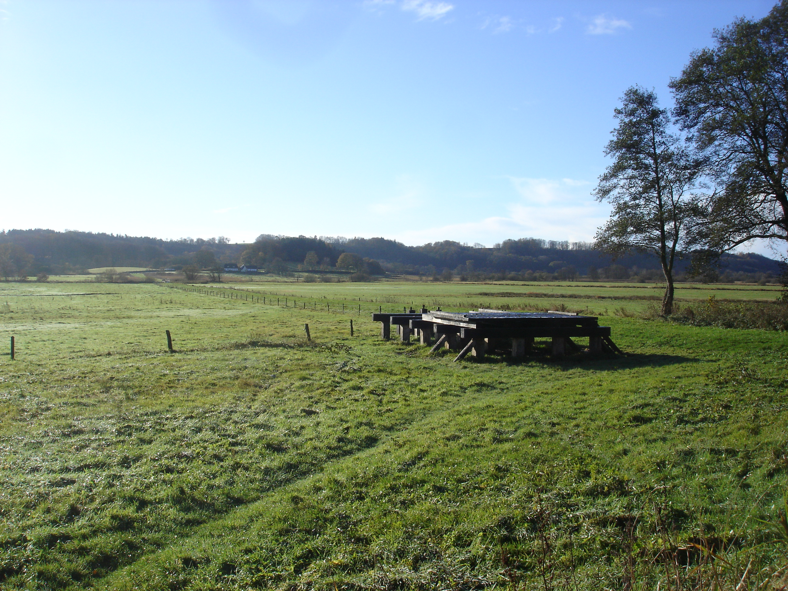 Rekonstruktion af Ravningbroen ved dens nordlige ende